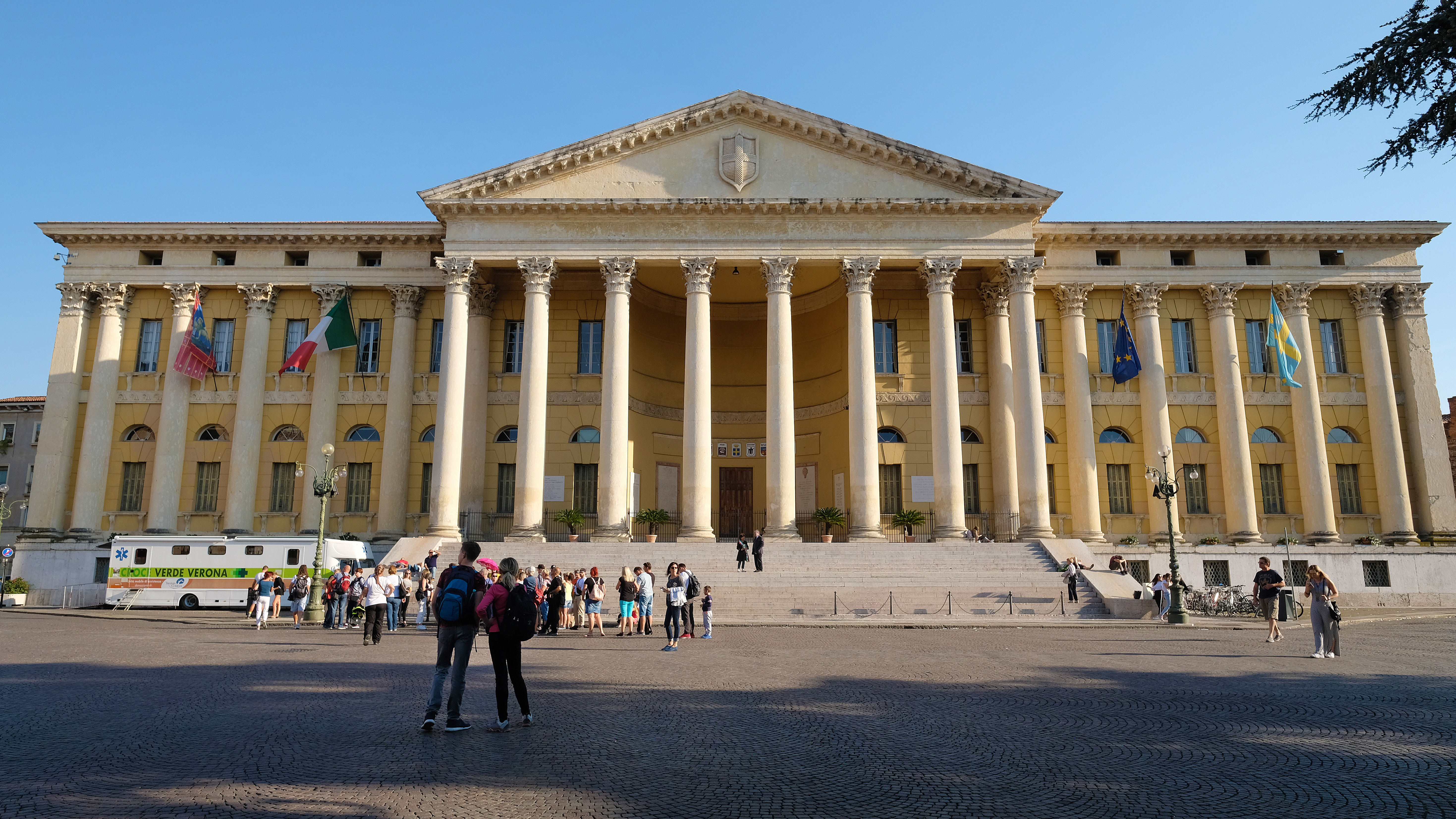 Palazzo Barbieri This is a photo of a monument which is part of cultural heritage of Italy.